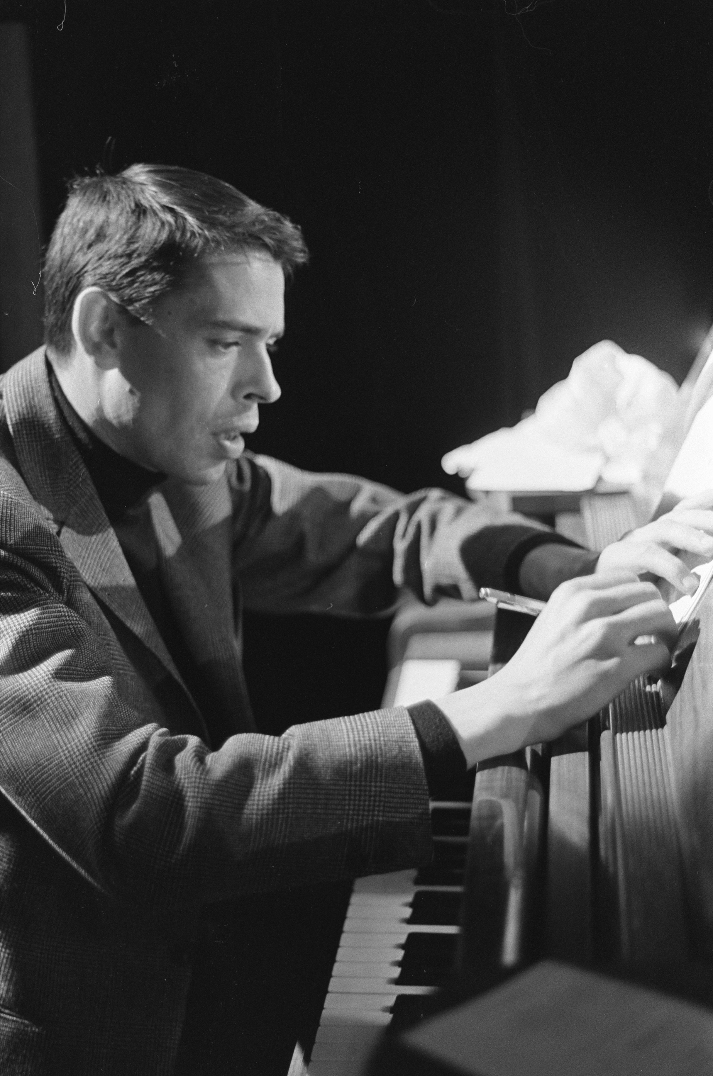 Collectie / Archief : Fotocollectie Anefo Reportage / Serie : [ onbekend ] Beschrijving : TV-uitzending "Domino" Jacques Brel tijdens de opname in Amsterdam, Marcanti Datum : 20 februari 1963 Locatie : Amsterdam, Noord-Holland Trefwoorden : TV-programma's, zangers Persoonsnaam : Brel, Jacques Fotograaf : Bilsen, Joop van / Anefo Auteursrechthebbende : Nationaal Archief Materiaalsoort : Negatief (zwart/wit) Nummer archiefinventaris : bekijk toegang 2.24.01.05 Bestanddeelnummer : 914-8398